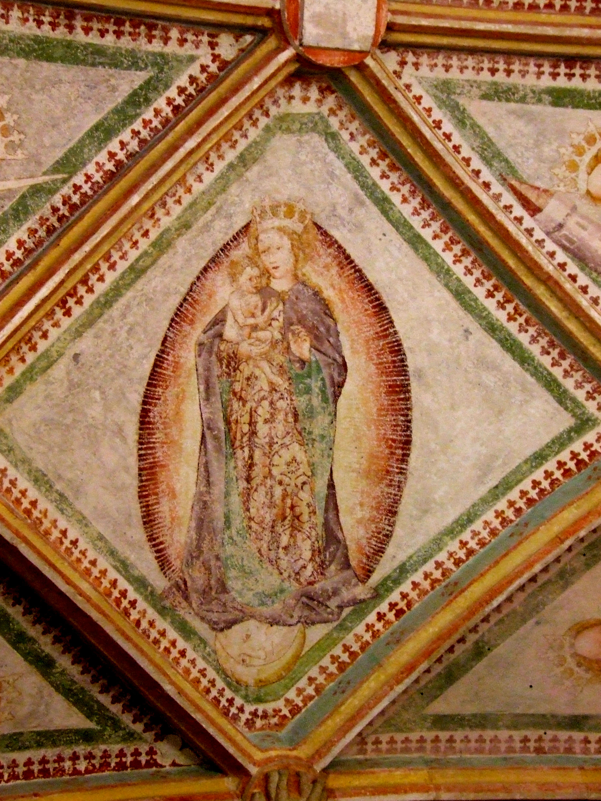 Marija_z_detetom_v_mandorli_stoječa_na_polmesecu_Mirna na Dolenjskem, ž.c.